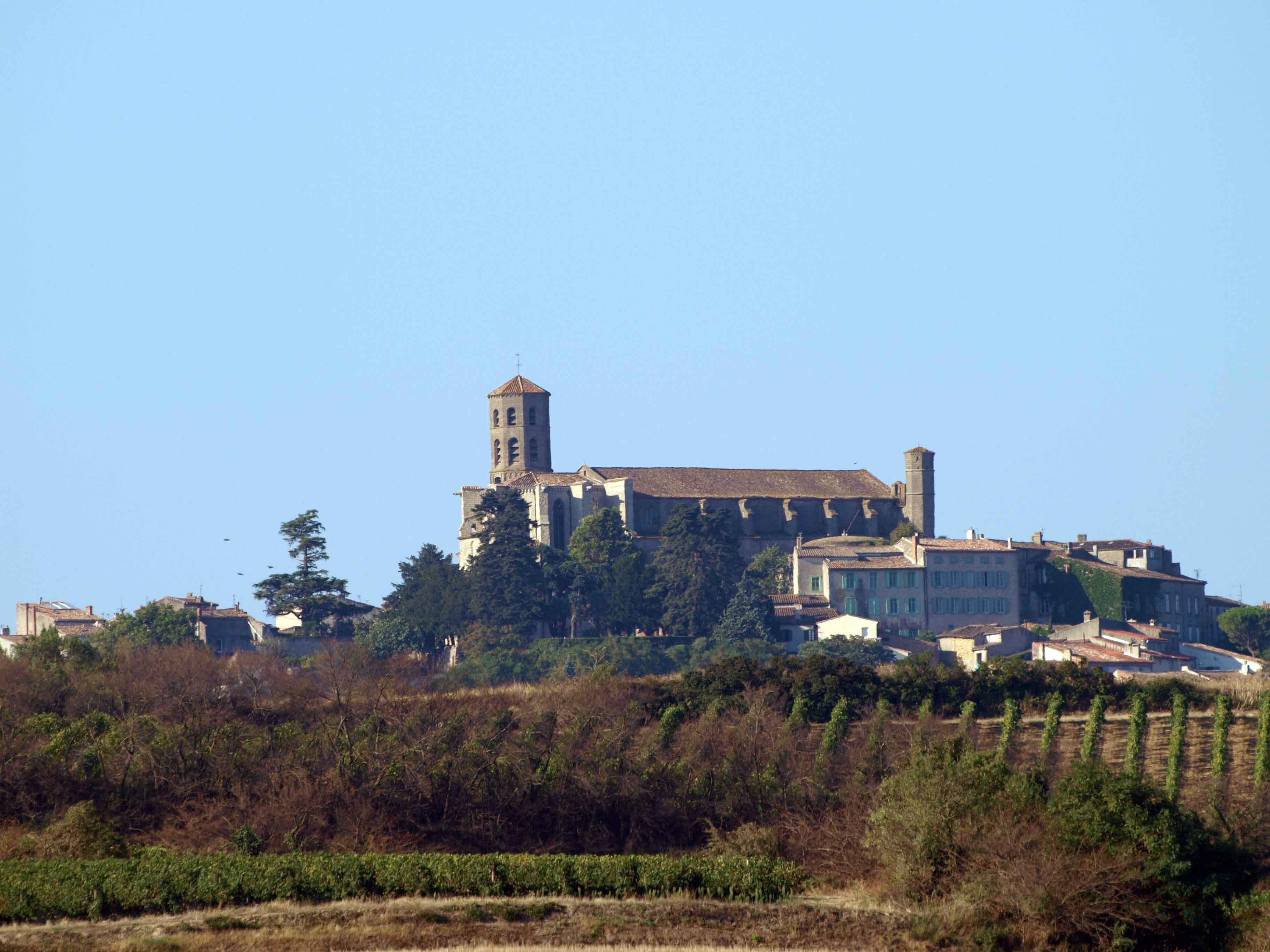 Vue générale de Montréal d'Aude